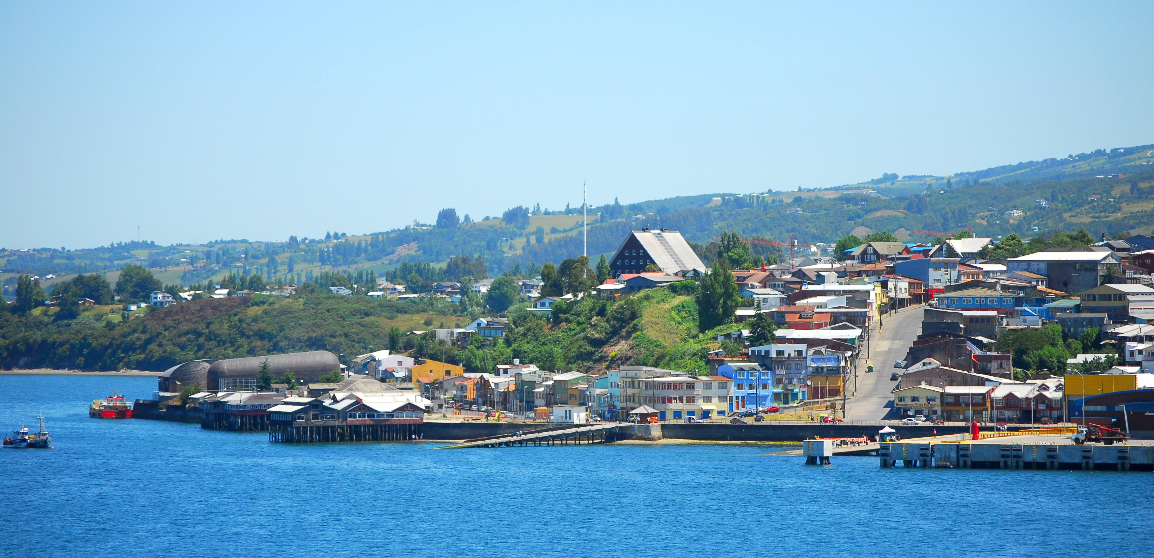 Bahia de Castro